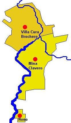 Área urbana de Mina Clavero - Villa Cura Brochero - Nono